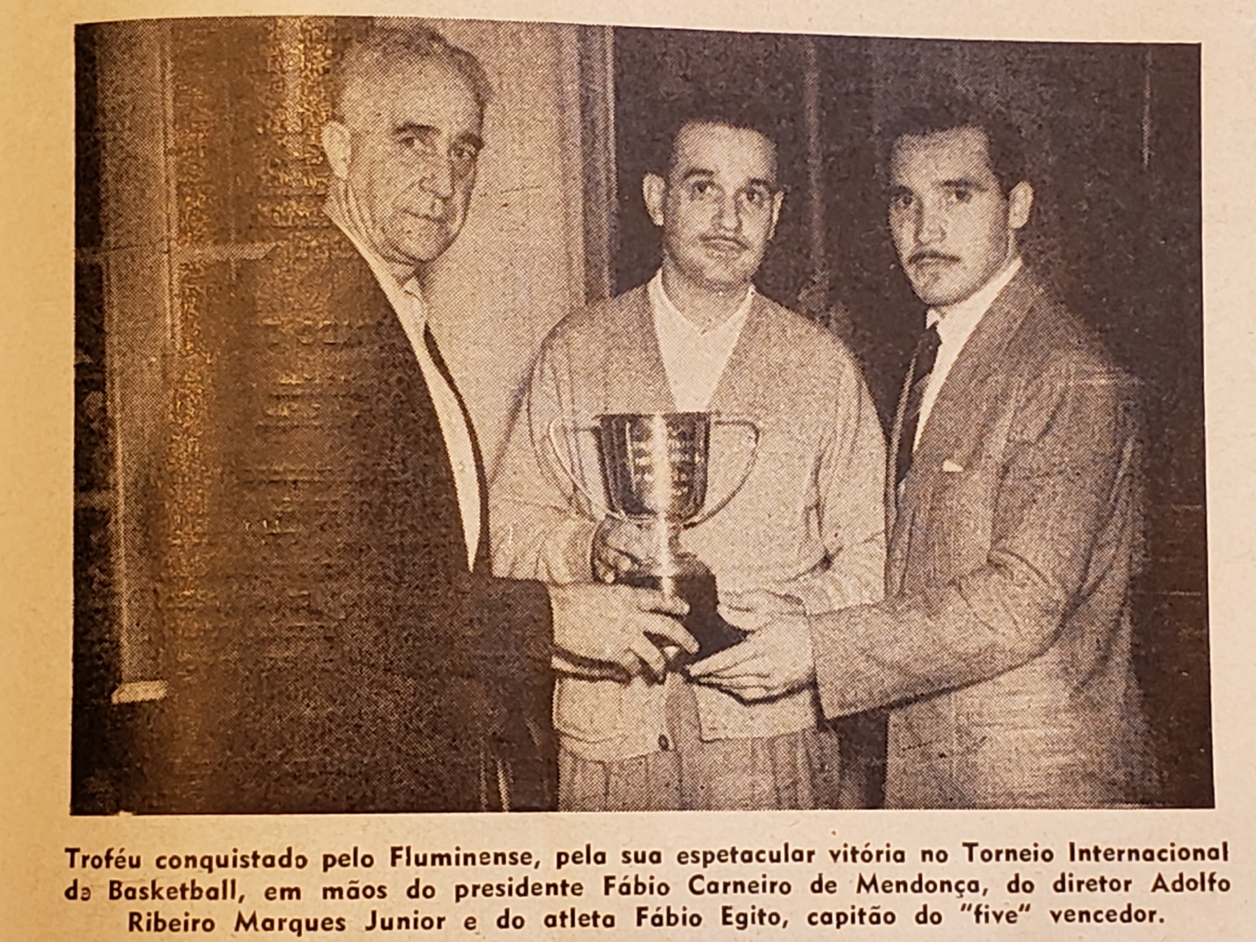 Taça conquistada pelo Fluminense campeão do Torneio Internacional de Basquete de 1952, disputado no Rio de Janeiro.